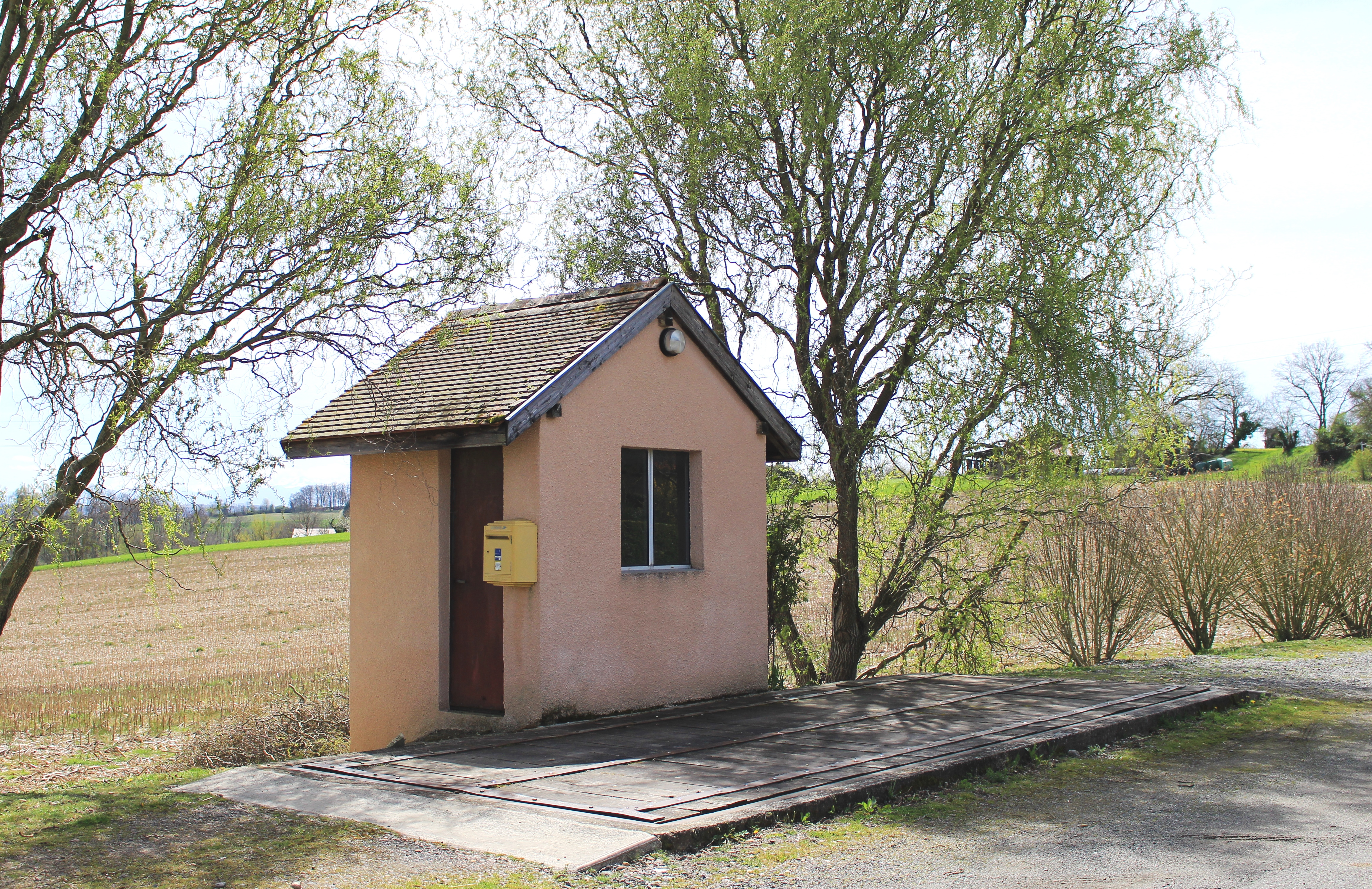 Bascule de Sadournin (Hautes-Pyrénées)